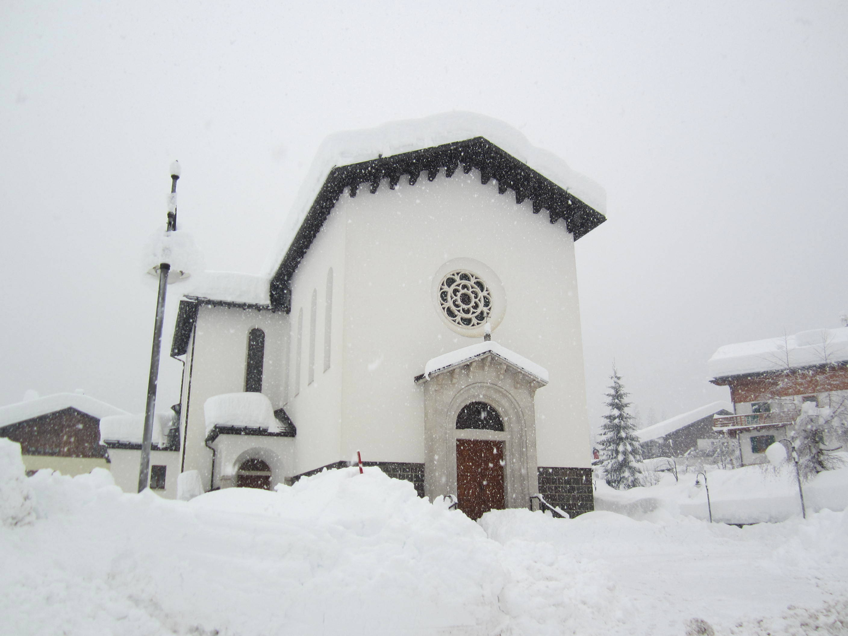 Chiesa Parrocchiale della frazione del comune di Falcade, Caviola